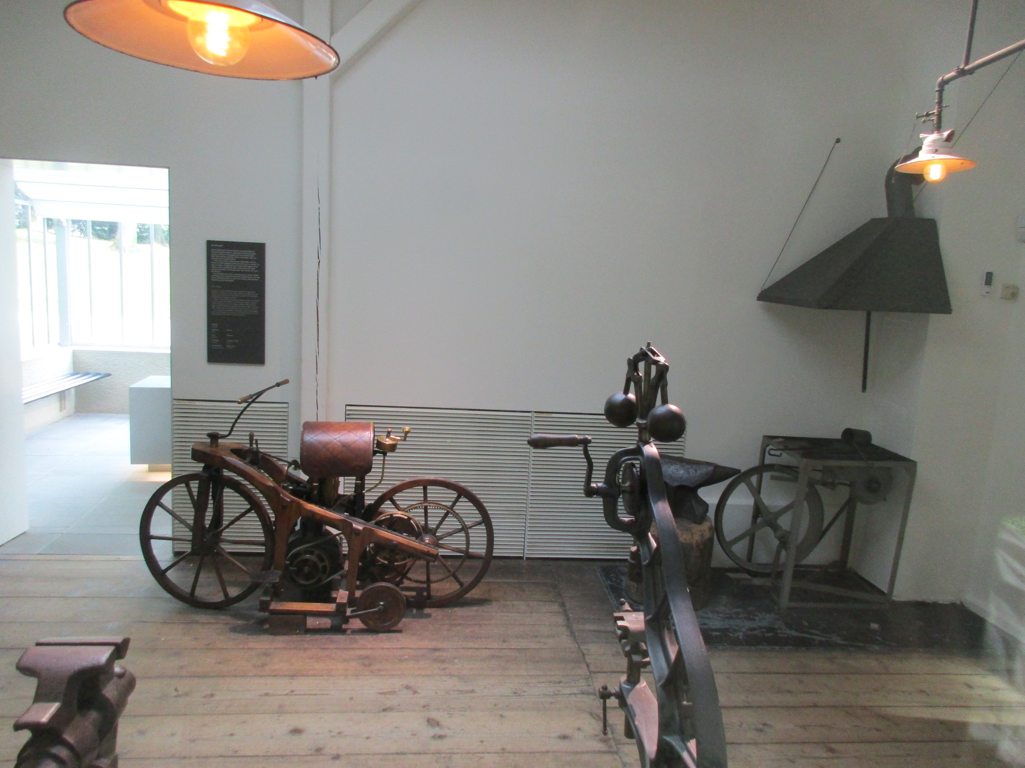 Gottlieb-Daimler-Gedächtnisstätte